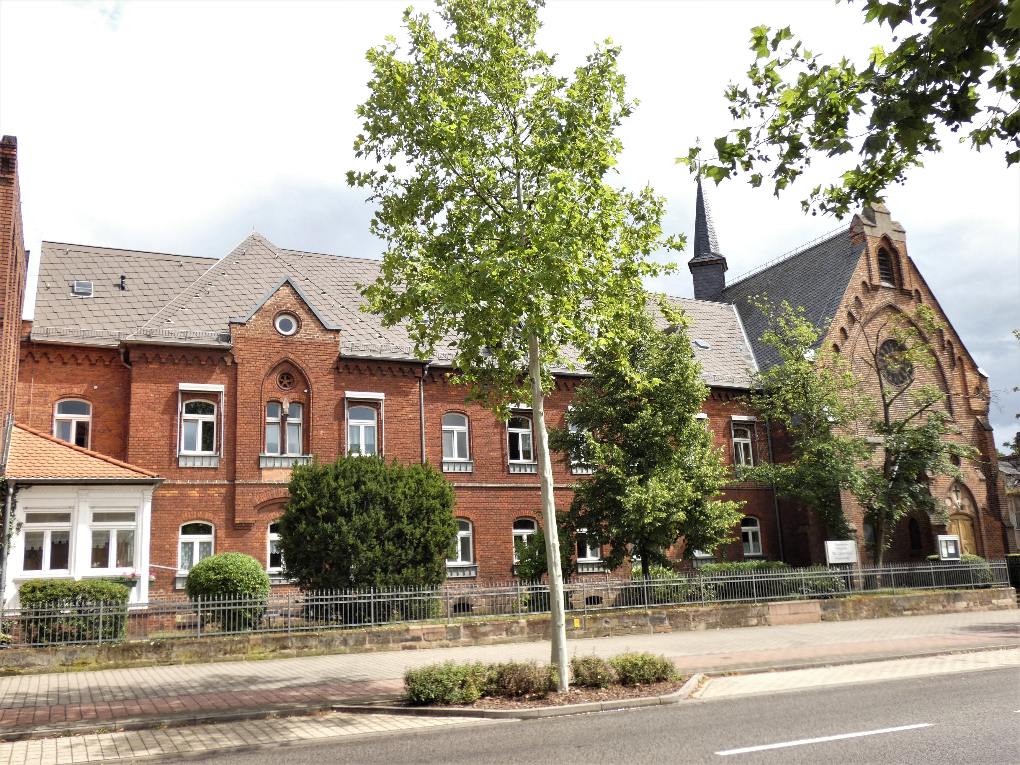 Hospitalkrche St. Laurentii mit angeschlossenem Pflegeheim "Sankt Laurentius"